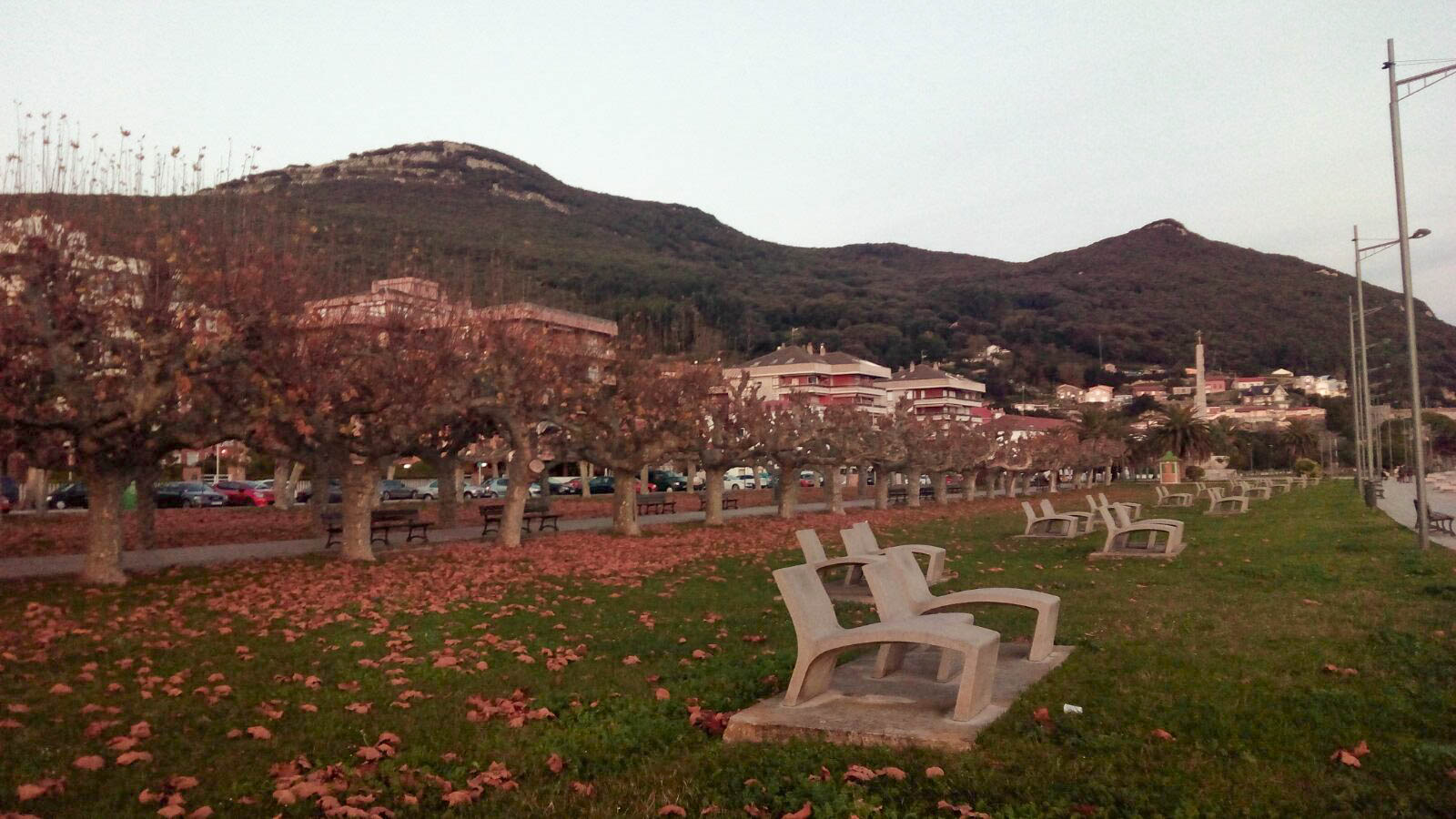 Foto del Monte Buciero desde el paseo marítimo de Santoña.